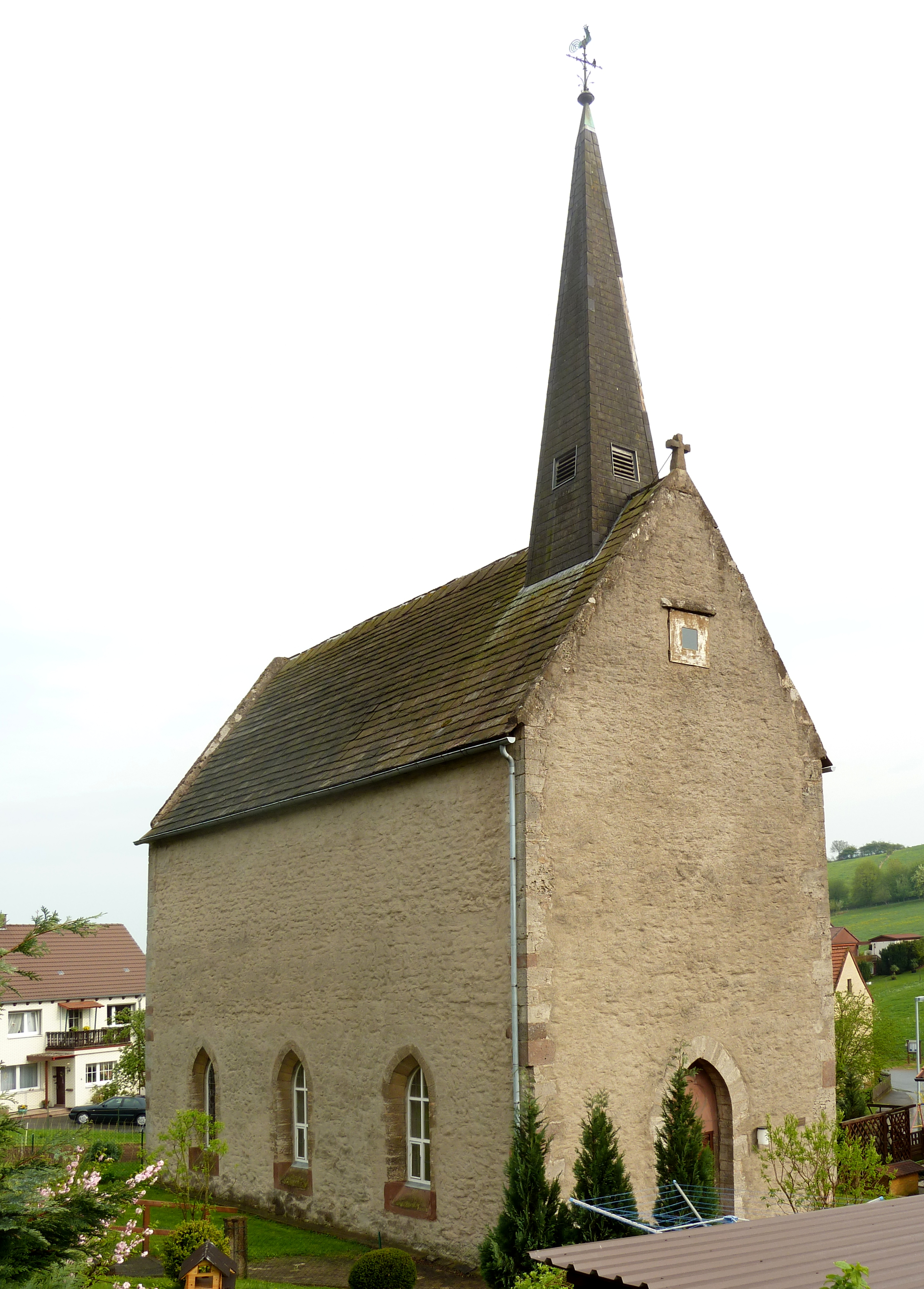 Ev.-luth. Kapelle St. Nikolai in Oldenrode, Stadt Moringen, Landkreis Northeim, Niedersachsen. Erbaut als Wehrturm um 1300, Umbau mit Dachreiter, Eingang und Fenster 1899/1900 nach Entwurf von Conrad Wilhelm Hase. Ansicht von Nordwesten, Foto leicht perspektivisch entzerrt